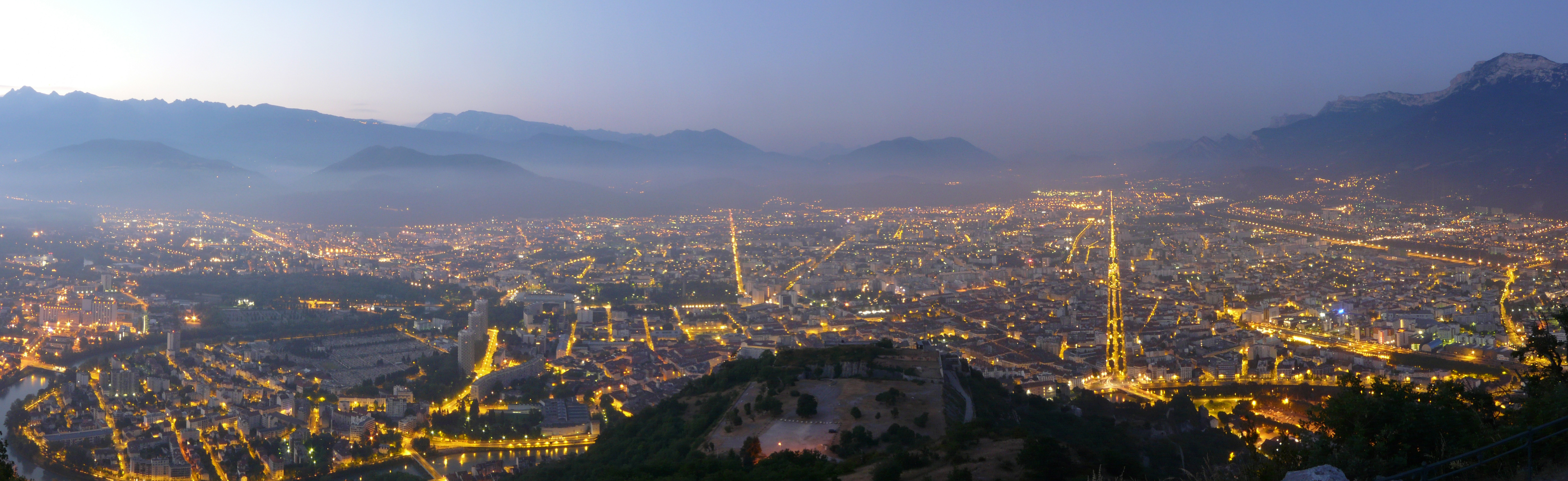 Grenoble de nuit